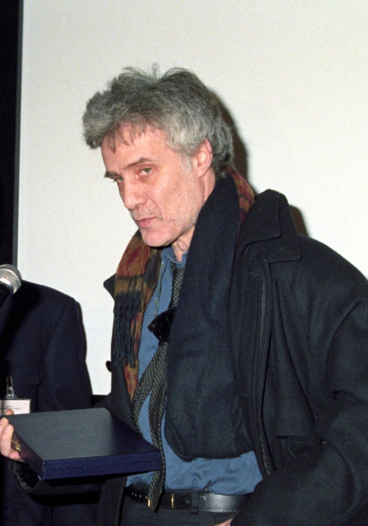 Carlo De Mejo